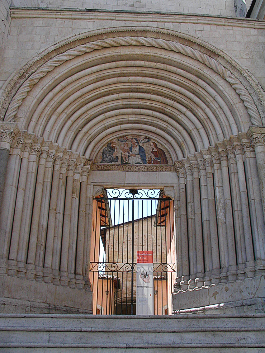 San Francesco della Scarpa (Sulmona)